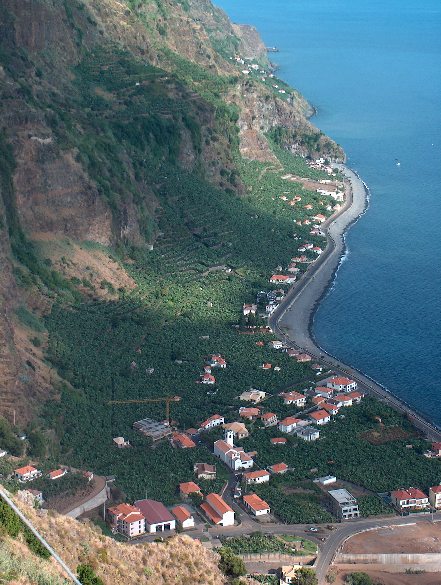 Freguesia da Madalena do Mar na Ilha da Madeira